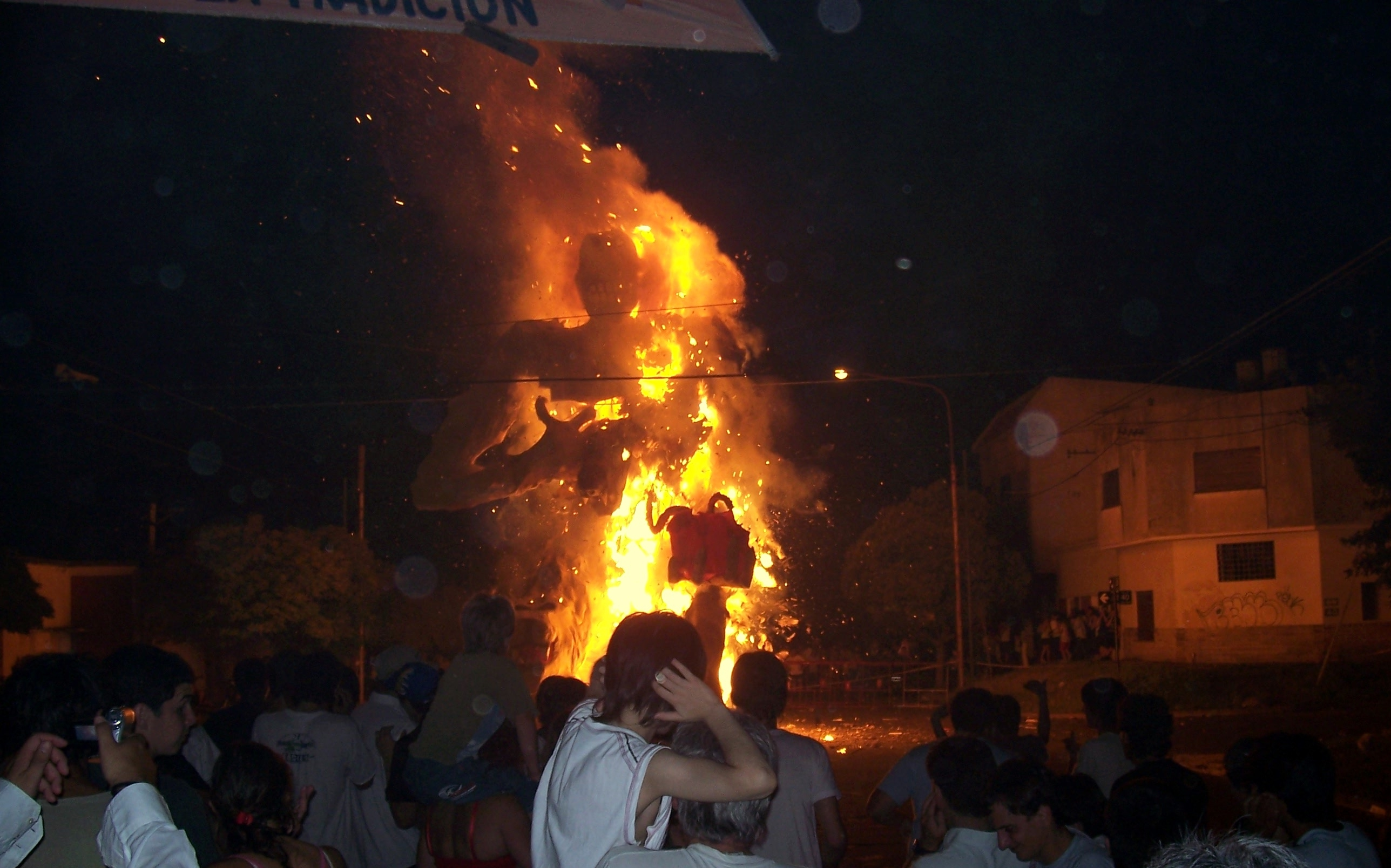 Tradicional quema del muñeco en la ciudad de La Plata. Imagen del muñeco durante la quema.